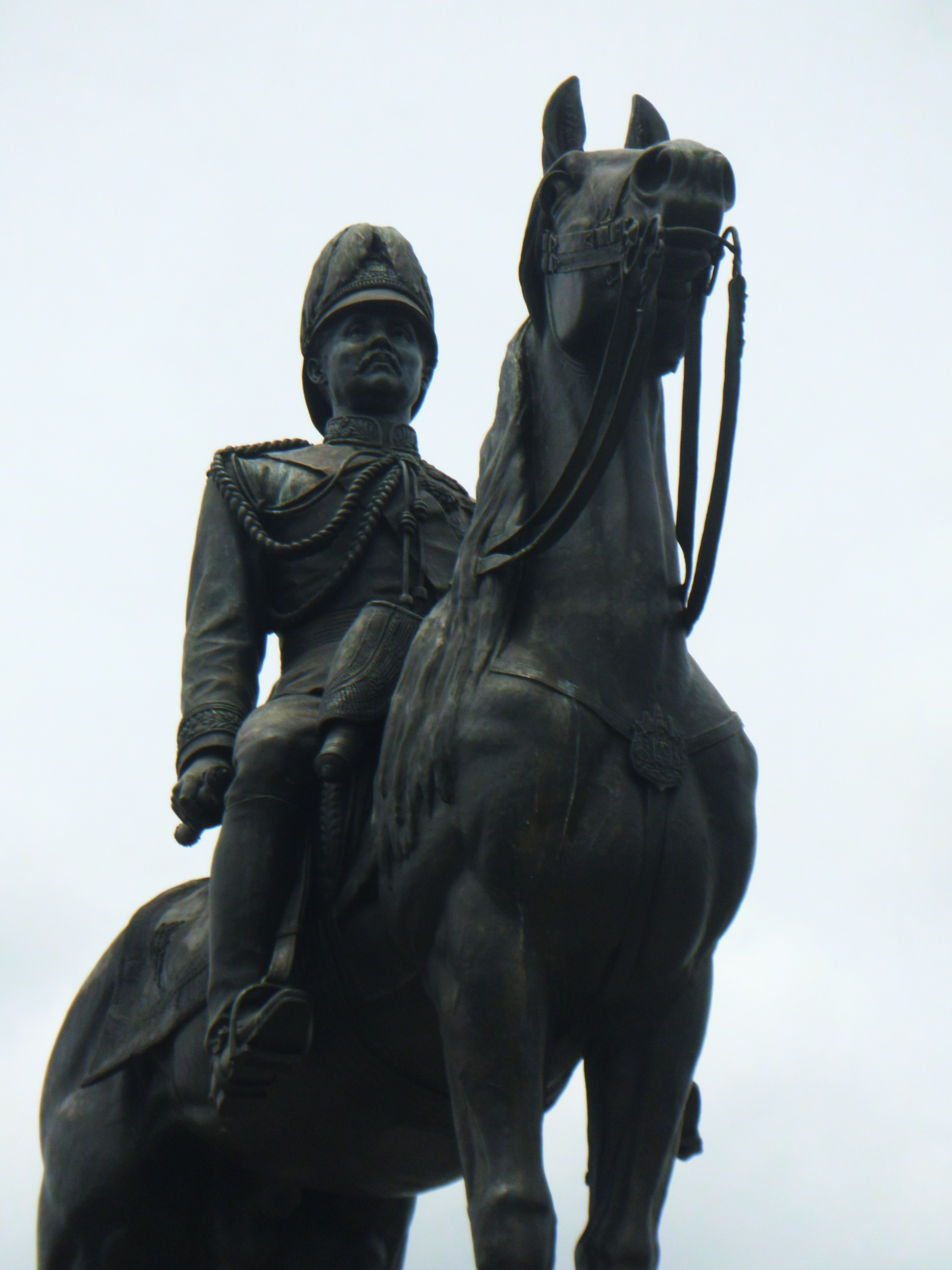 พระบรมราชานุสาวรีย์ พระบรมรูปทรงม้า